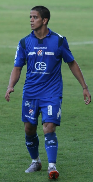 Luis Ibáñez